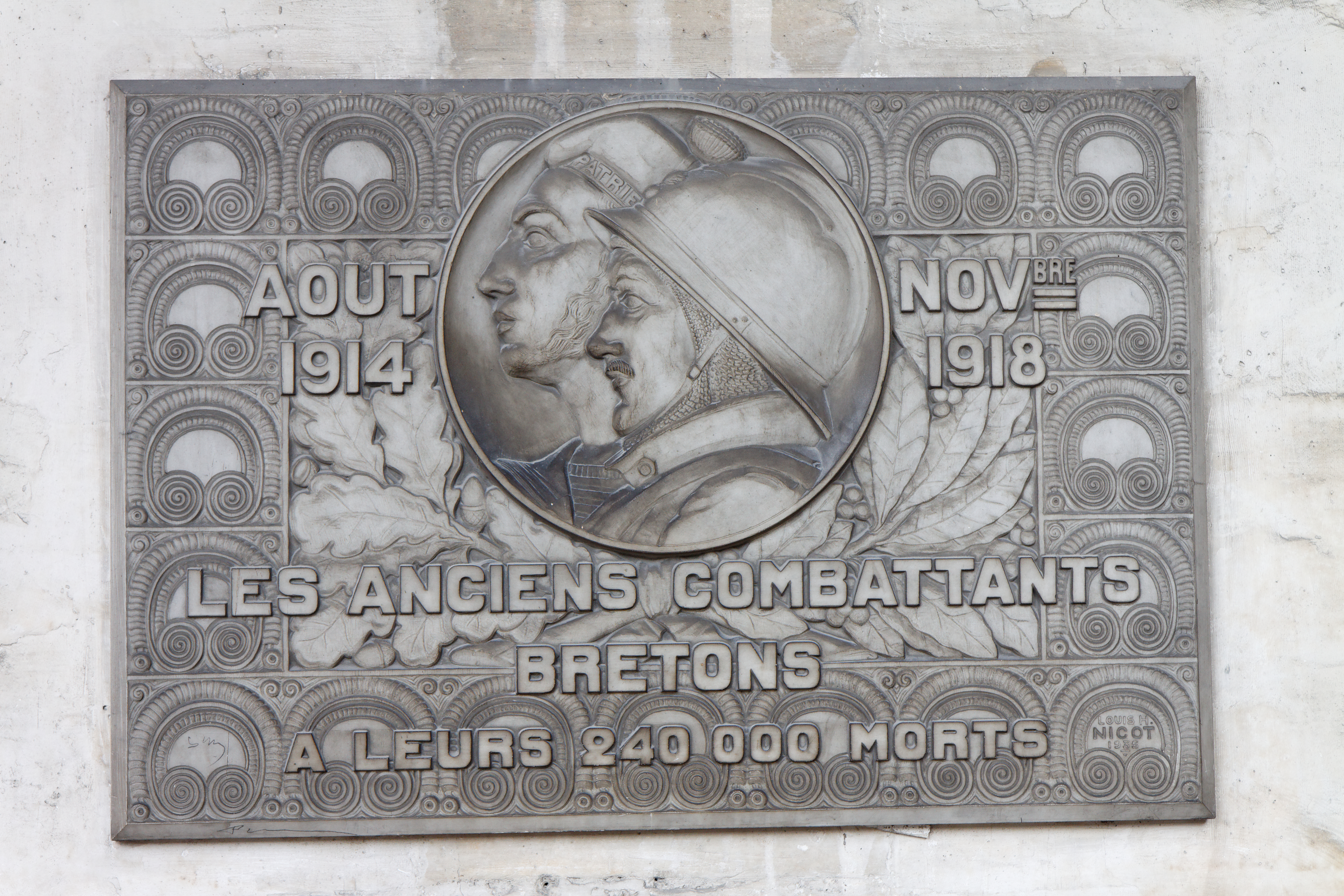 Plaque commémorative rendant hommage aux soldats morts pour la France. .